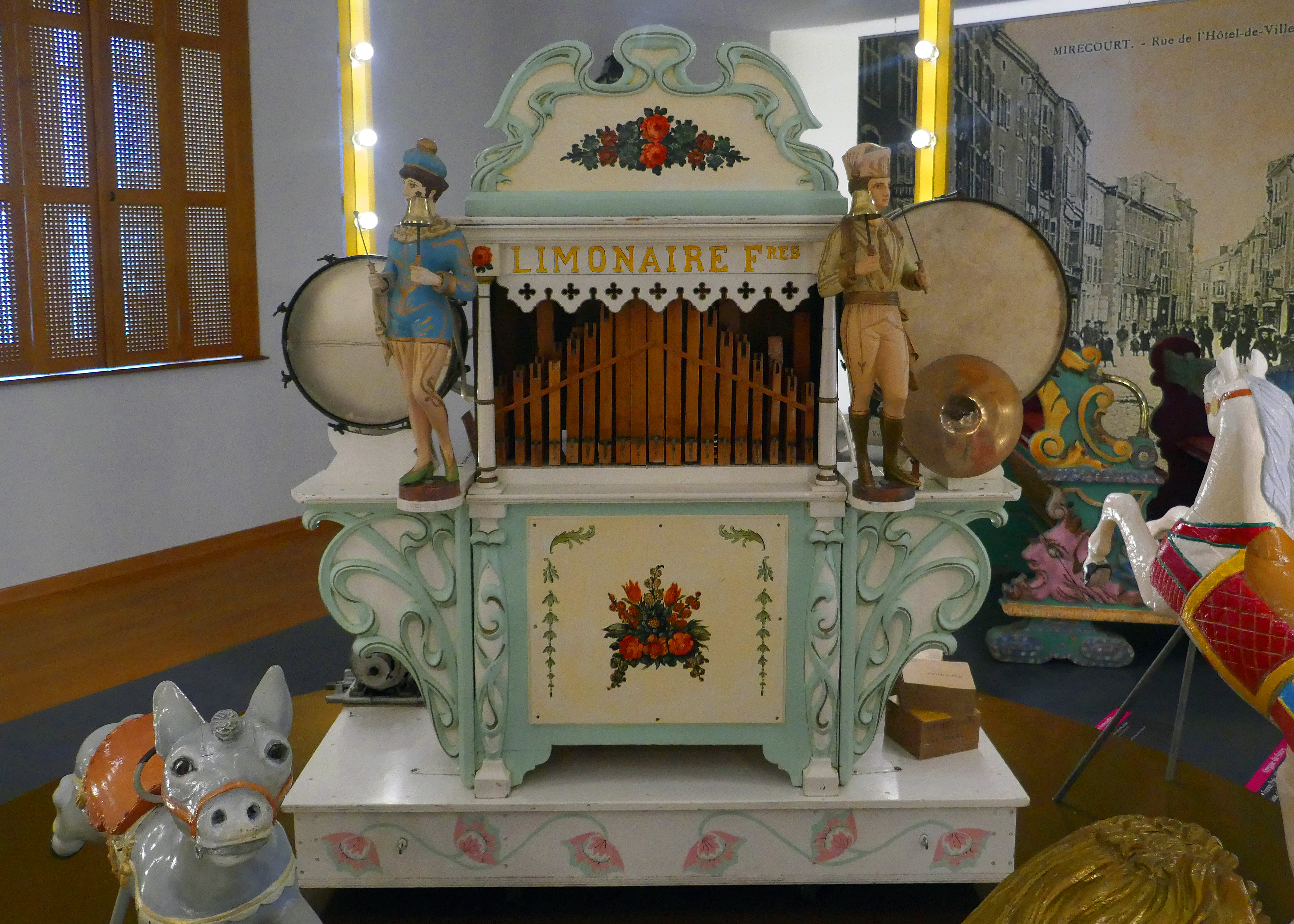 Orgue de foire Limonaire Frères Paris, 1905 35 touches, 2 consoles portant grosse caisse, caisse claire, cymbale et 2 automates en bois sculptés et peints Maison de la musique mécanique et de la dentelle, Mirecourt (Vosges)